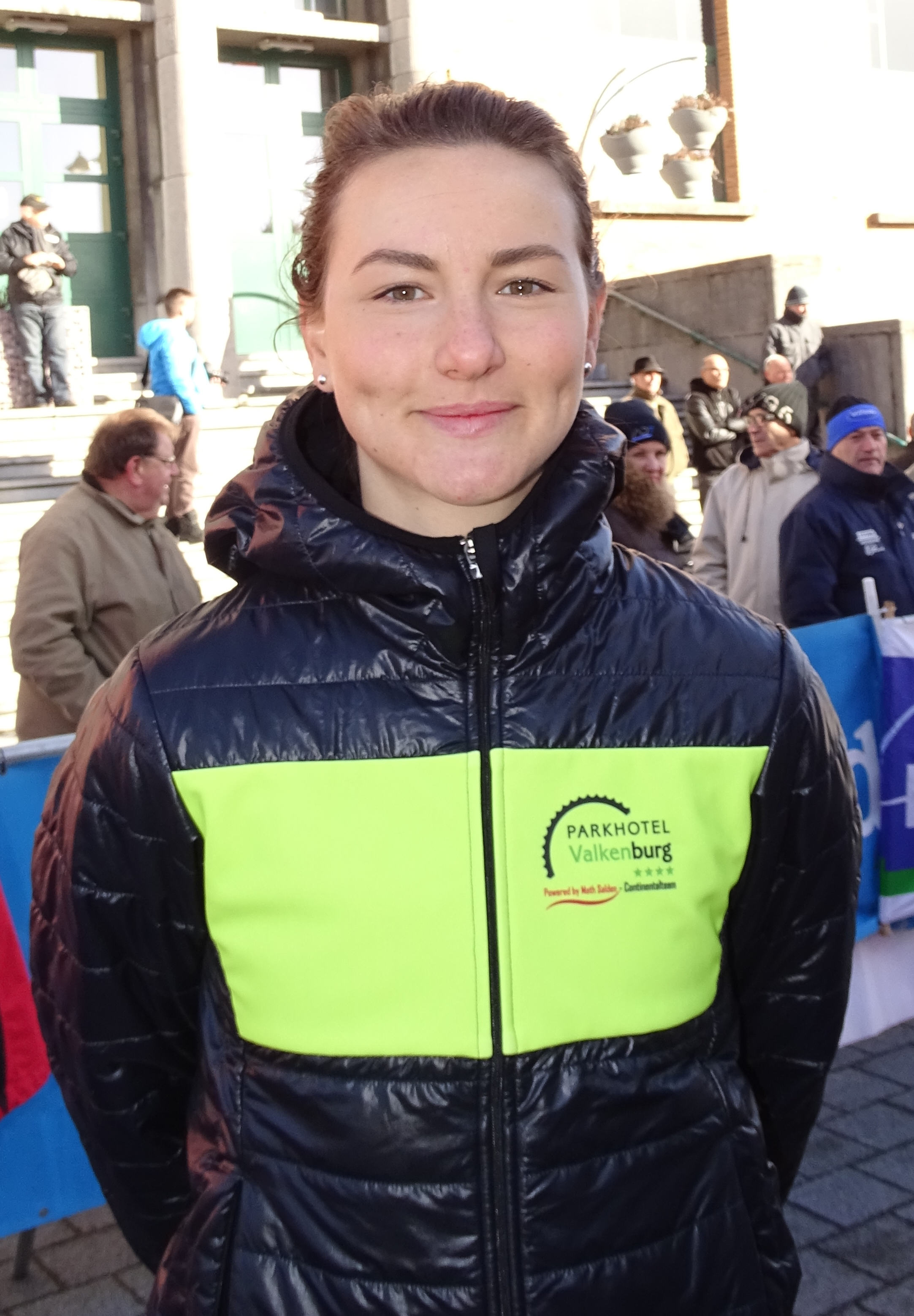 Reportage réalisé le mercredi 2 mars à l'occasion du départ du Samyn des Dames 2016 et du Samyn 2016 à Quaregnon, Belgique.